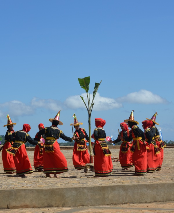 Tarian Lumense yang di pertunjukkan di kaki gunung Sangia Wita, Desa Wisata Tangkeno dalam menyambut peserta Sail Indonesia 2015